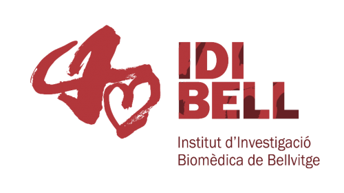 Logotipo del Instituto de Investigación de Bellvitge (IDIBELL)